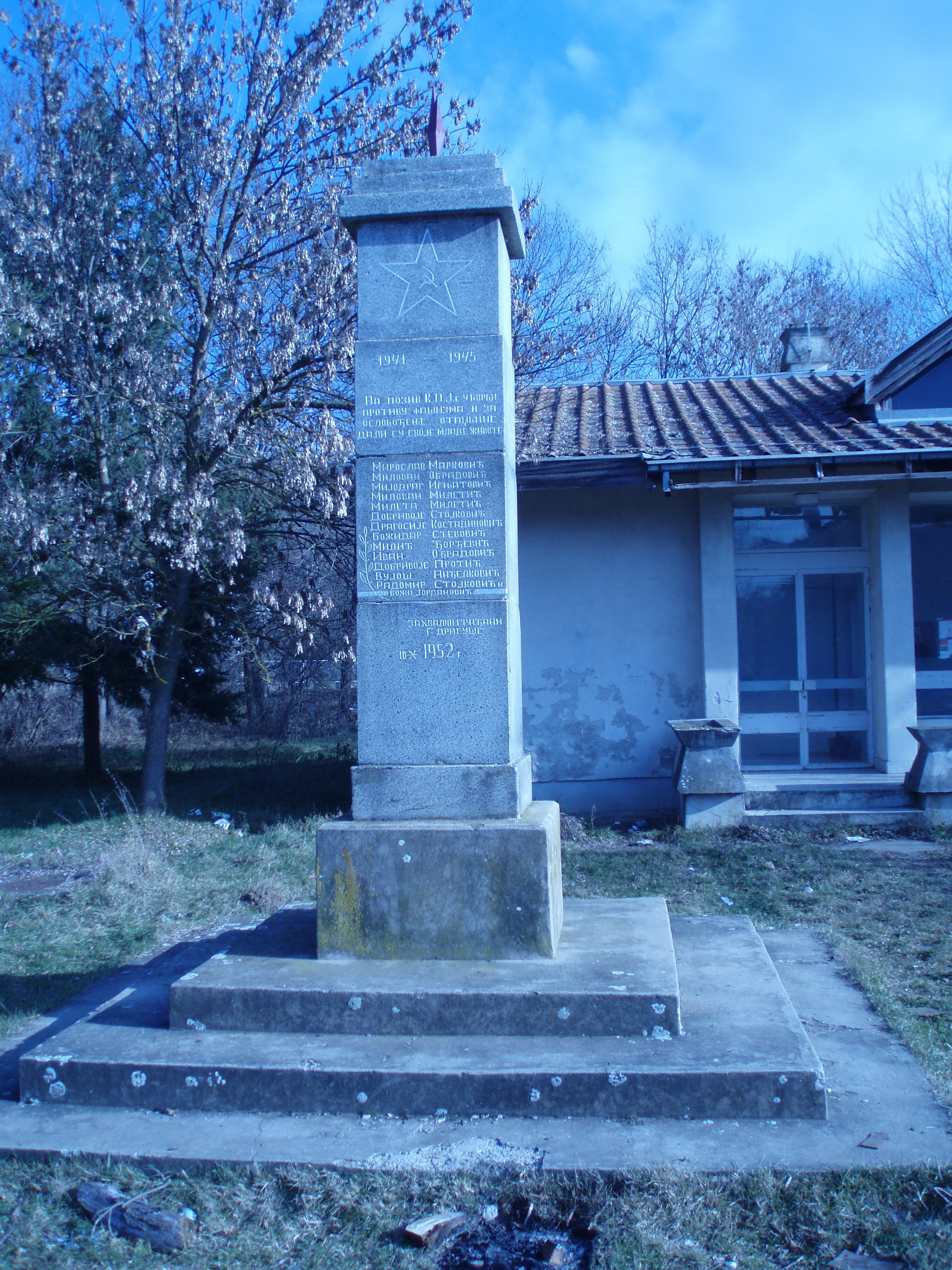 Немања Поповић сликао сопственом камером